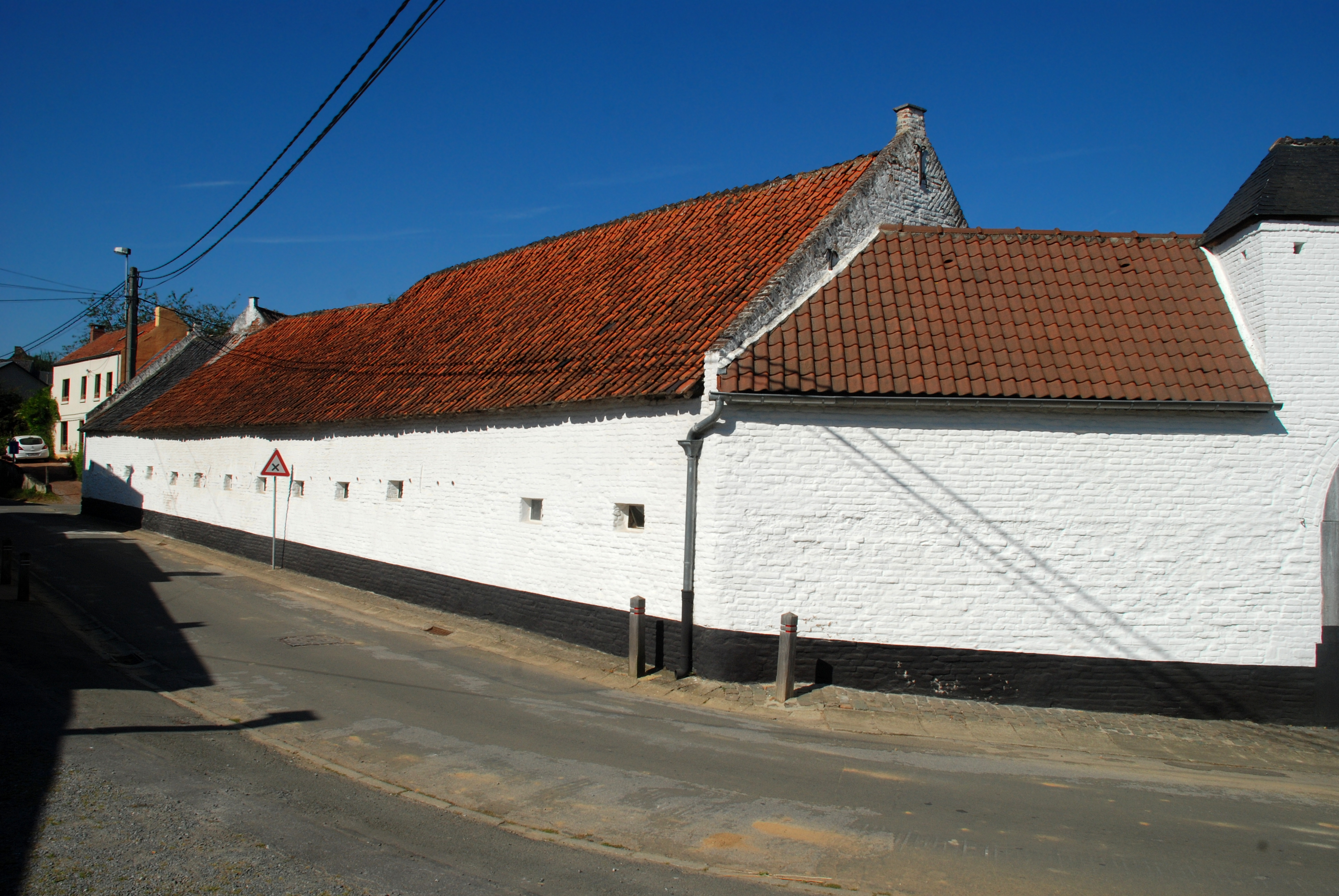 Belgique - Brabant wallon - Court-Saint-Étienne - Ferme de Beaurieux